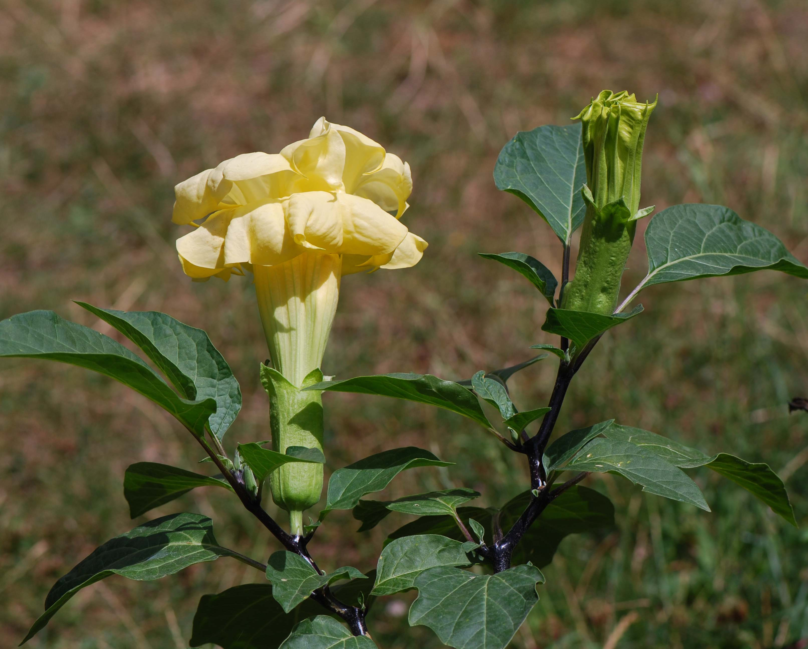 Datura metel, fleur double jaune, var. 'Chlorantha'